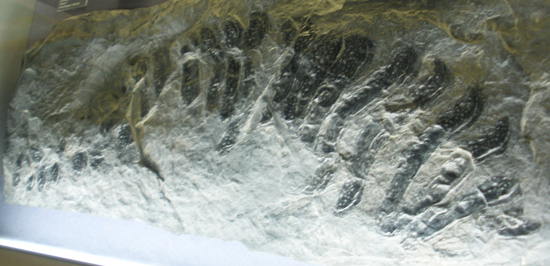 Fossil of Arthropleura, an extinct arthropod- Took the photo at Senckenberg Museum of Frankfurt